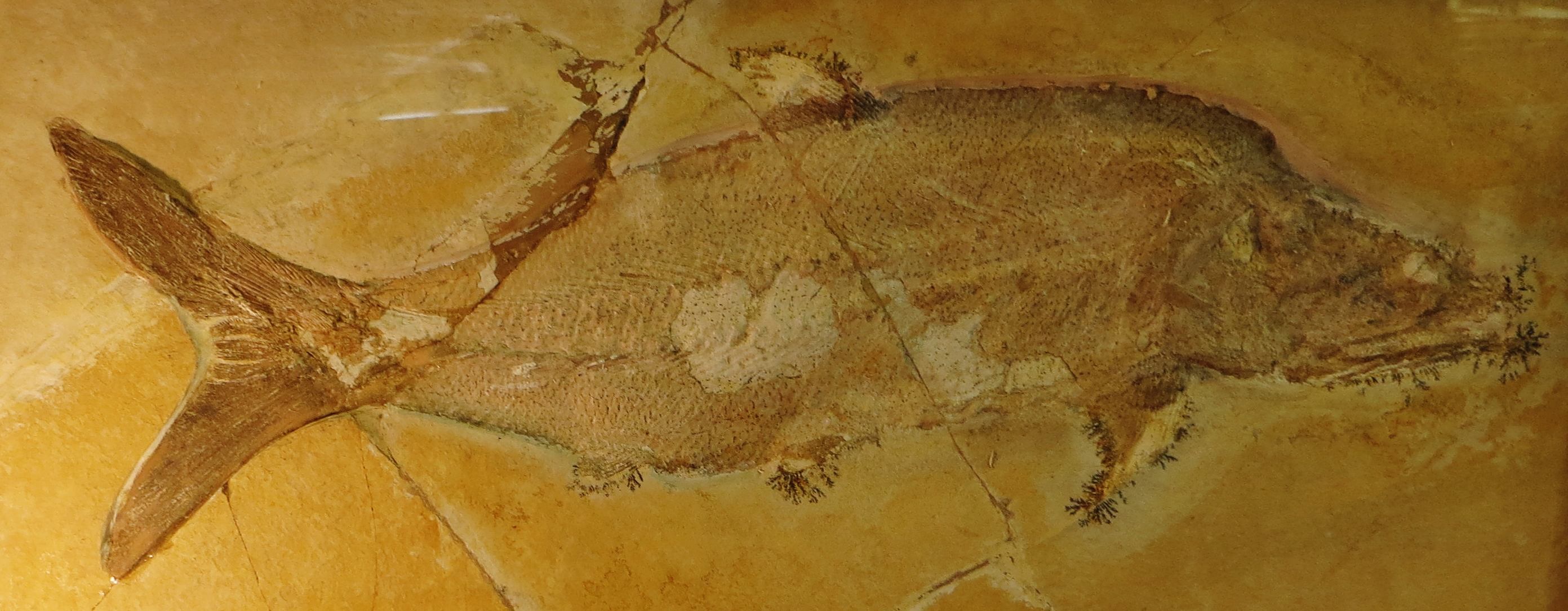 Fossil of Hypsocormus - Took the picture at Natural History Museum, Bonn University